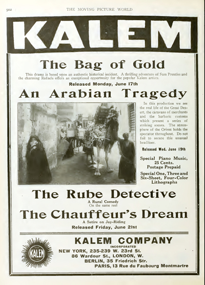 Advertising published in The Moving Picture World, Vol 12, p. 902